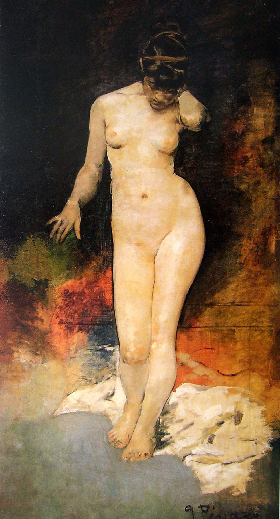 Desnudo de frente (1872-1879). Propiedad del Museo Nacional de Cerámica y Artes Suntuarias "González Martí" de Valencia. Spain.